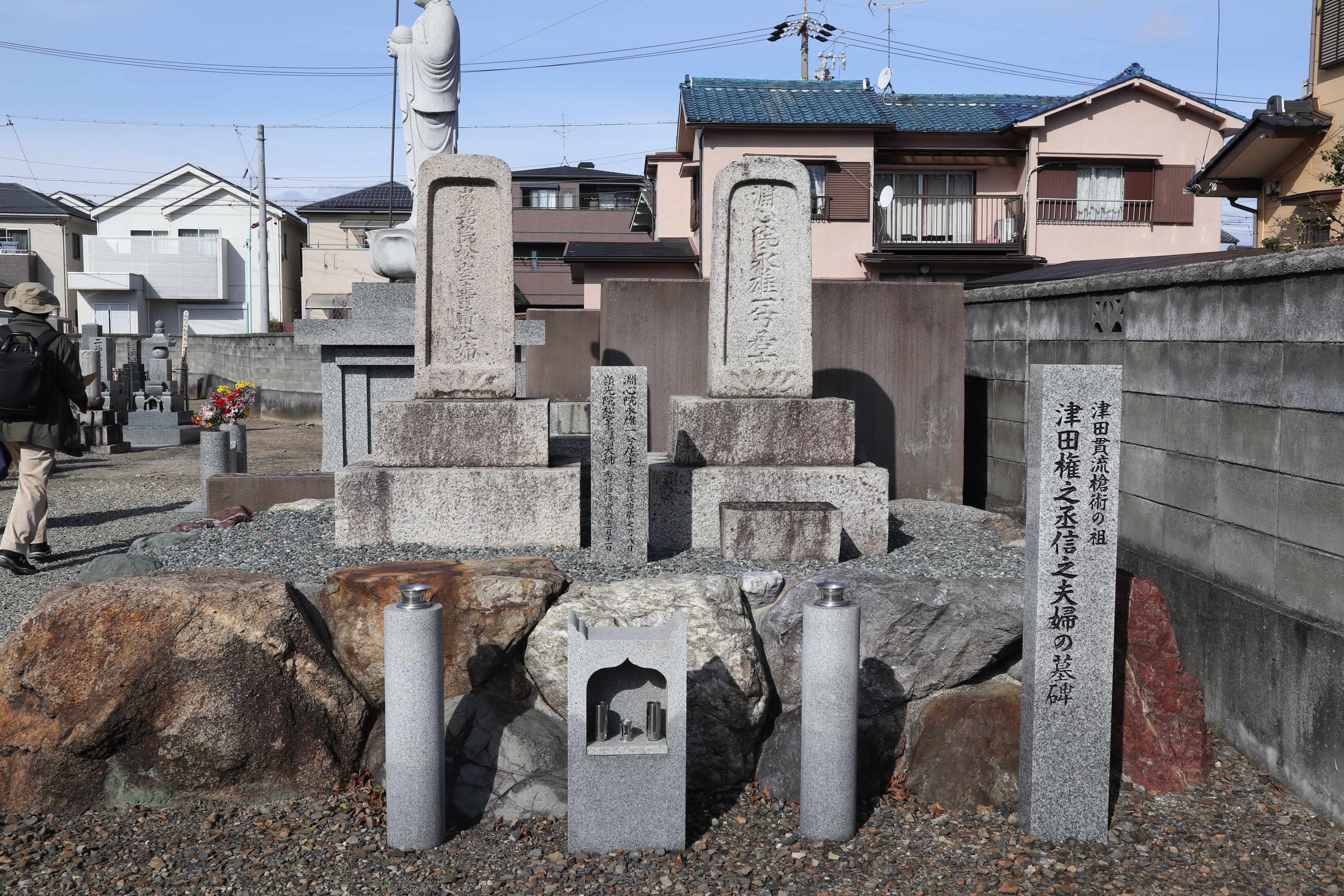 東雲寺（名古屋市）にある津田信之夫妻の墓